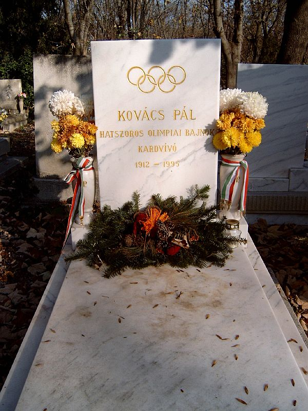 Kovács Pál (Debrecen, 1912. július 17. – Budapest, 1995. július 8.) hatszoros olimpiai bajnok vívó, sportvezető, honvédtiszt, Kovács Attila és Kovács Tamás világbajnok vívók apjának sírja Budapesten. Farkasréti temető: 8/2-1-73.